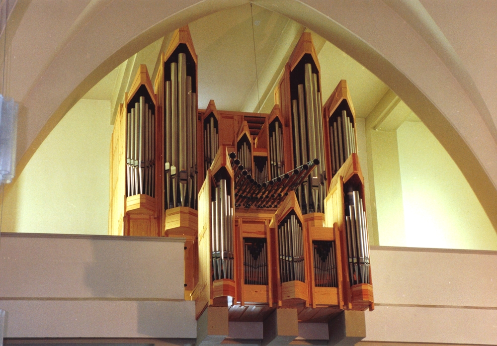 Orgel der kath. St.-Godehardt-Kirche in Hannover-Linden, gebaut von Emil Hammer Orgelbau